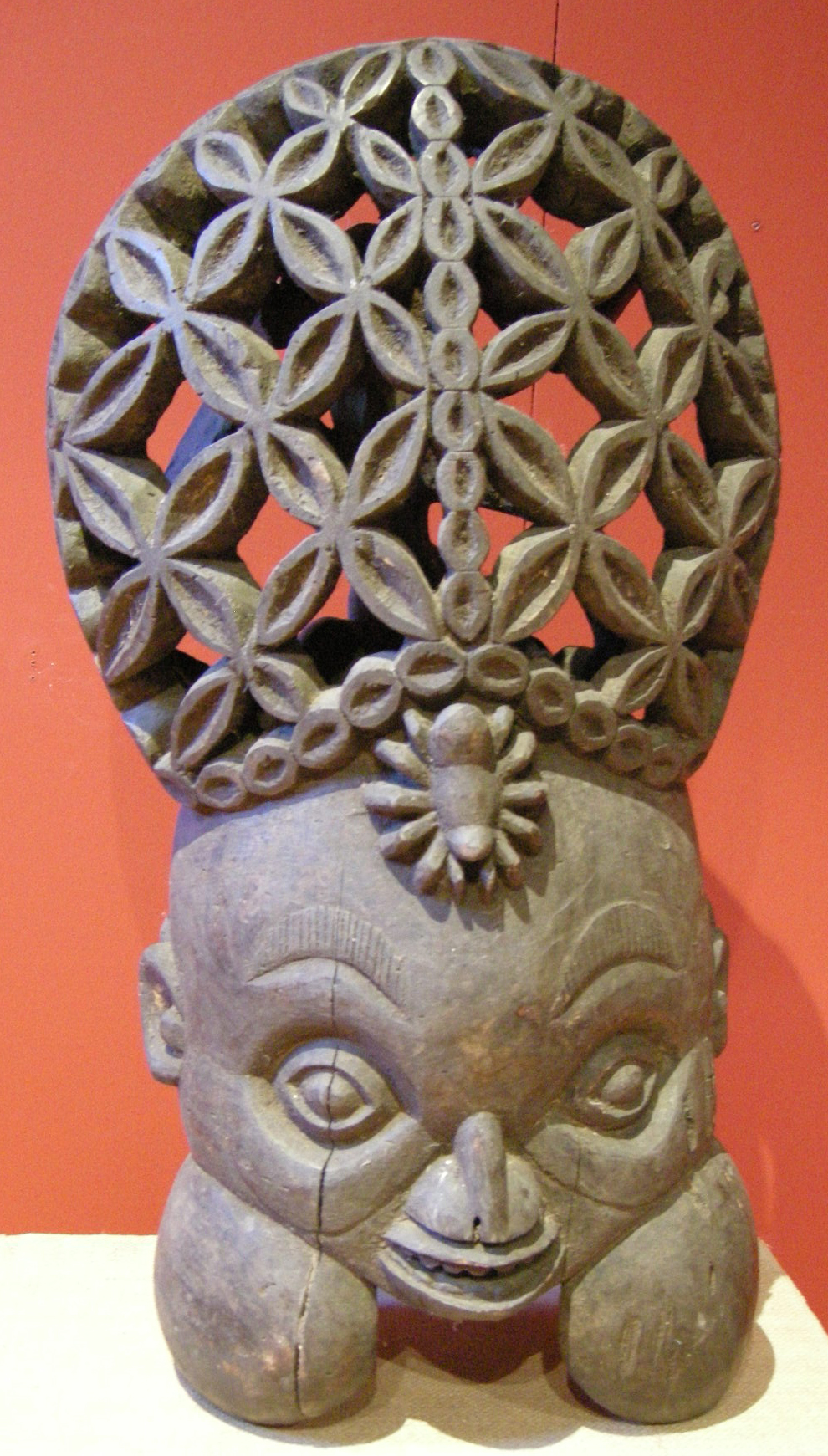 Arte dei bamun, camerun, maschera cerimoniale